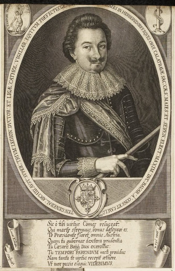 Grafik aus dem Klebeband Nr. 1 der Fürstlich Waldeckschen Hofbibliothek Arolsen Motiv: Adam von Herberstorff